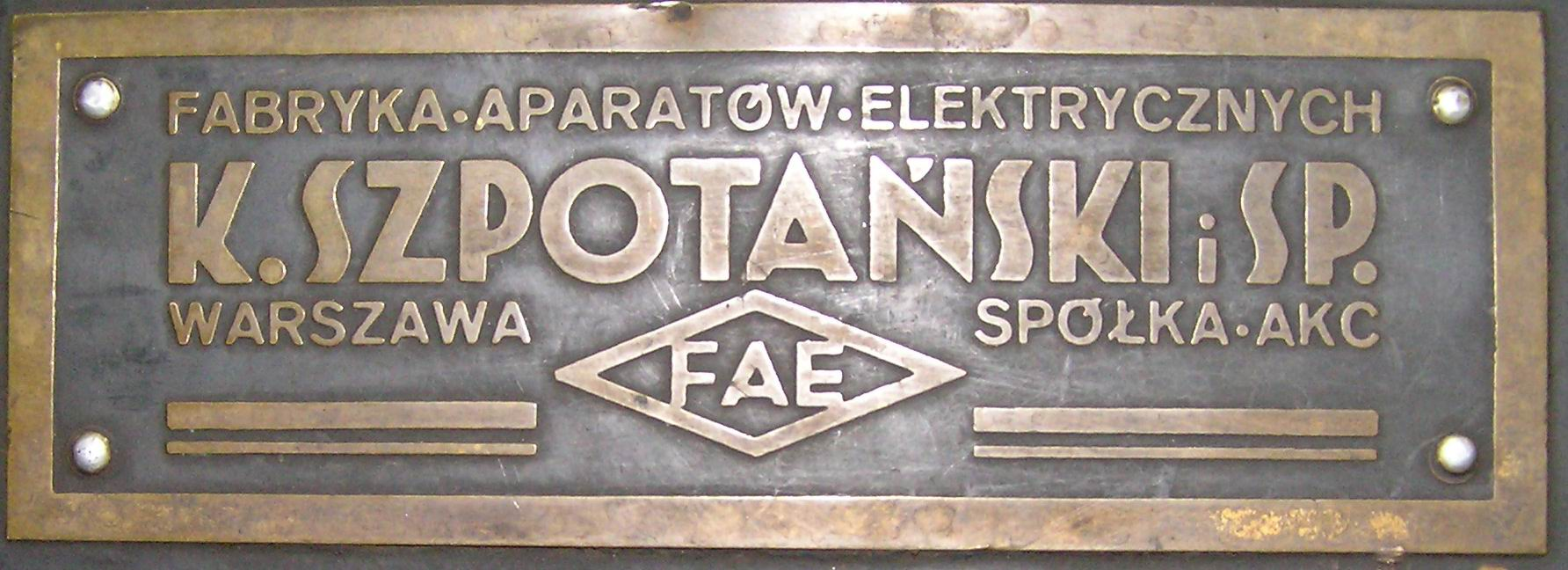 Logo firmy K. Szpotańskiego w Warszawie